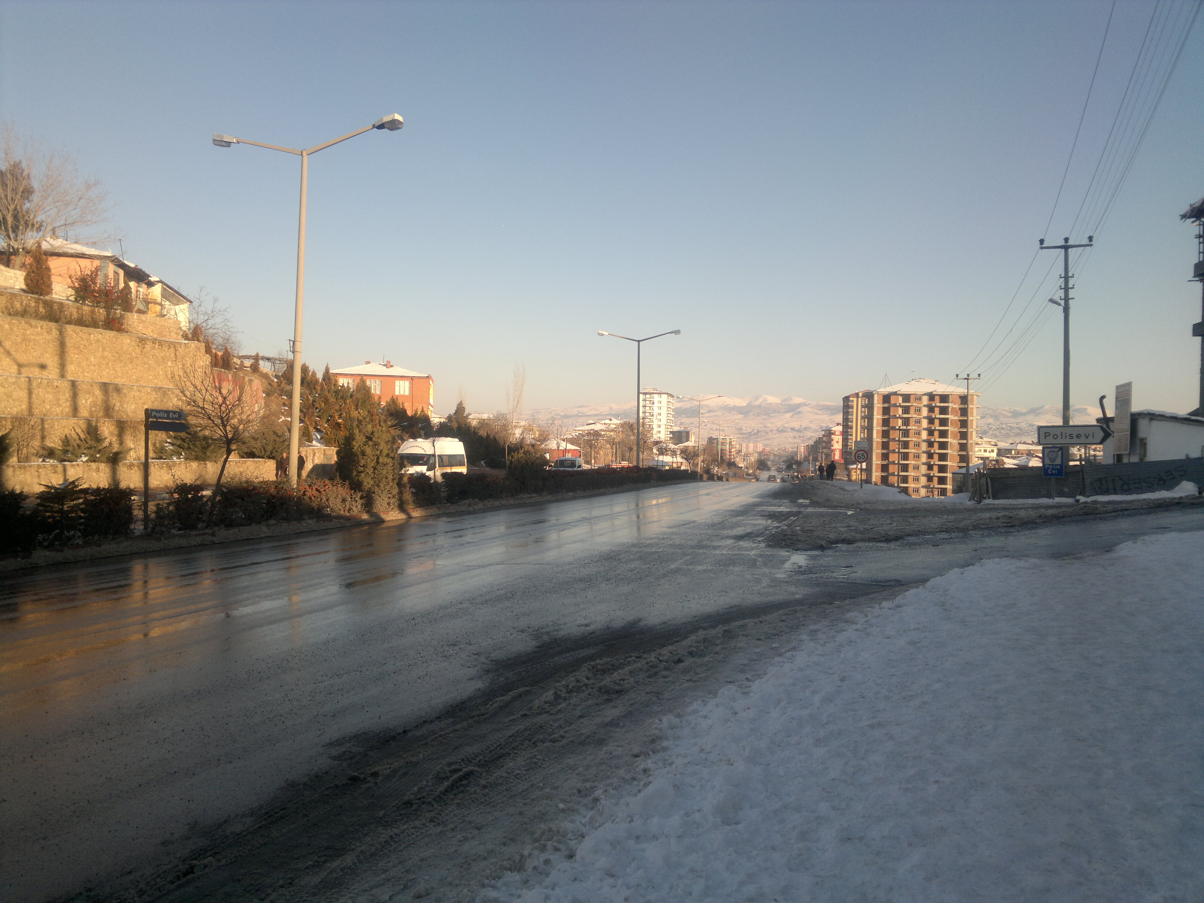 Bölge Trafiğin Önü